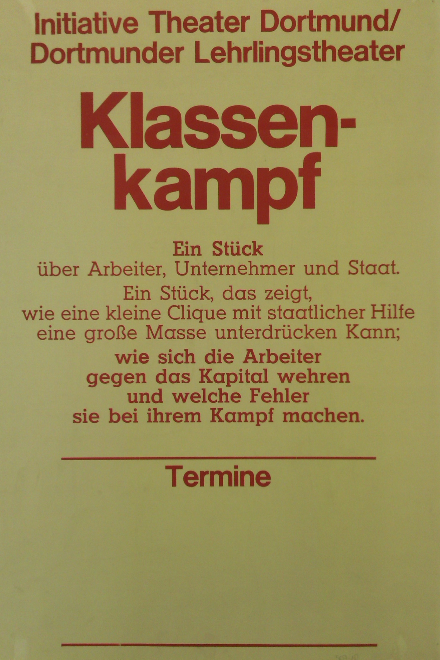 Eindruckplakat für das Stück "Klassenkampf", 1972